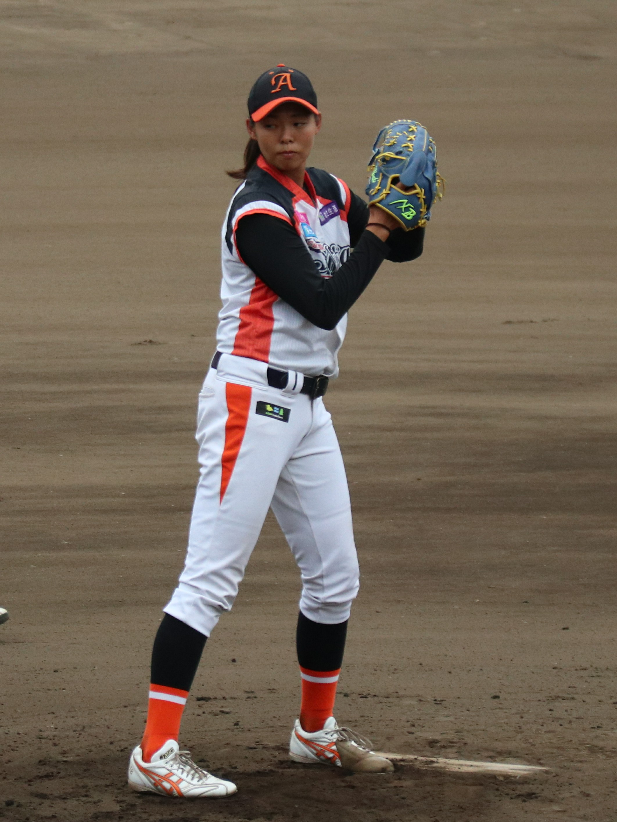 女子プロ野球選手